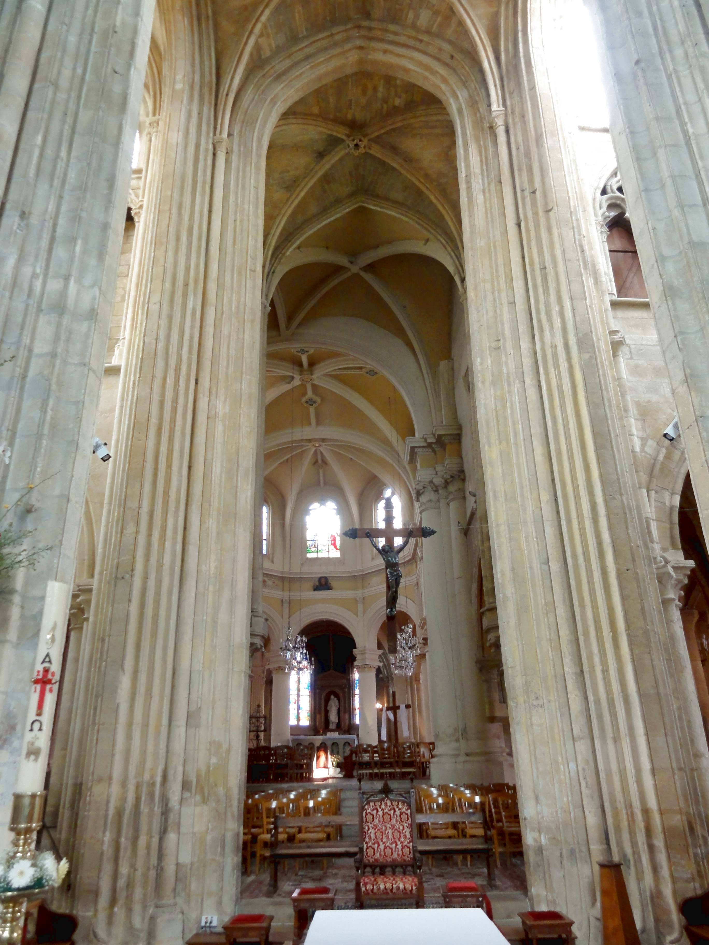 Intérieur de l'église - voir titre.